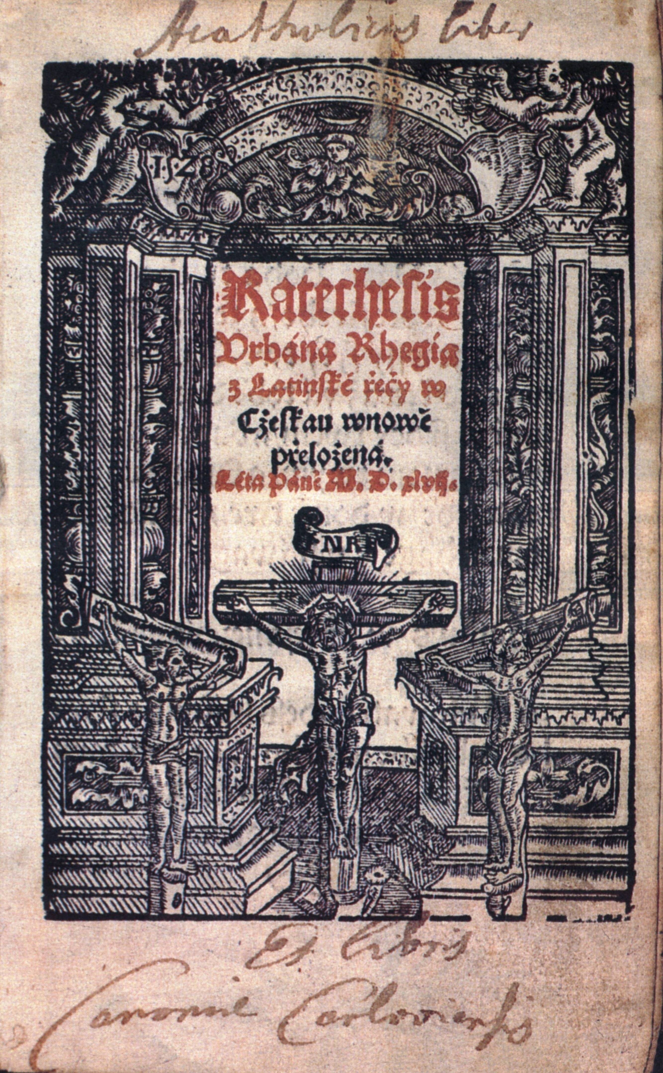 Katechesis Urbána Rhegía z latinské řeči w Cžeskau wnowě přeložená. Léta Páně M. D. xlvii. – Titulní list Katechismu Urbana Rhegia, vydaného Melantrichem roku 1547